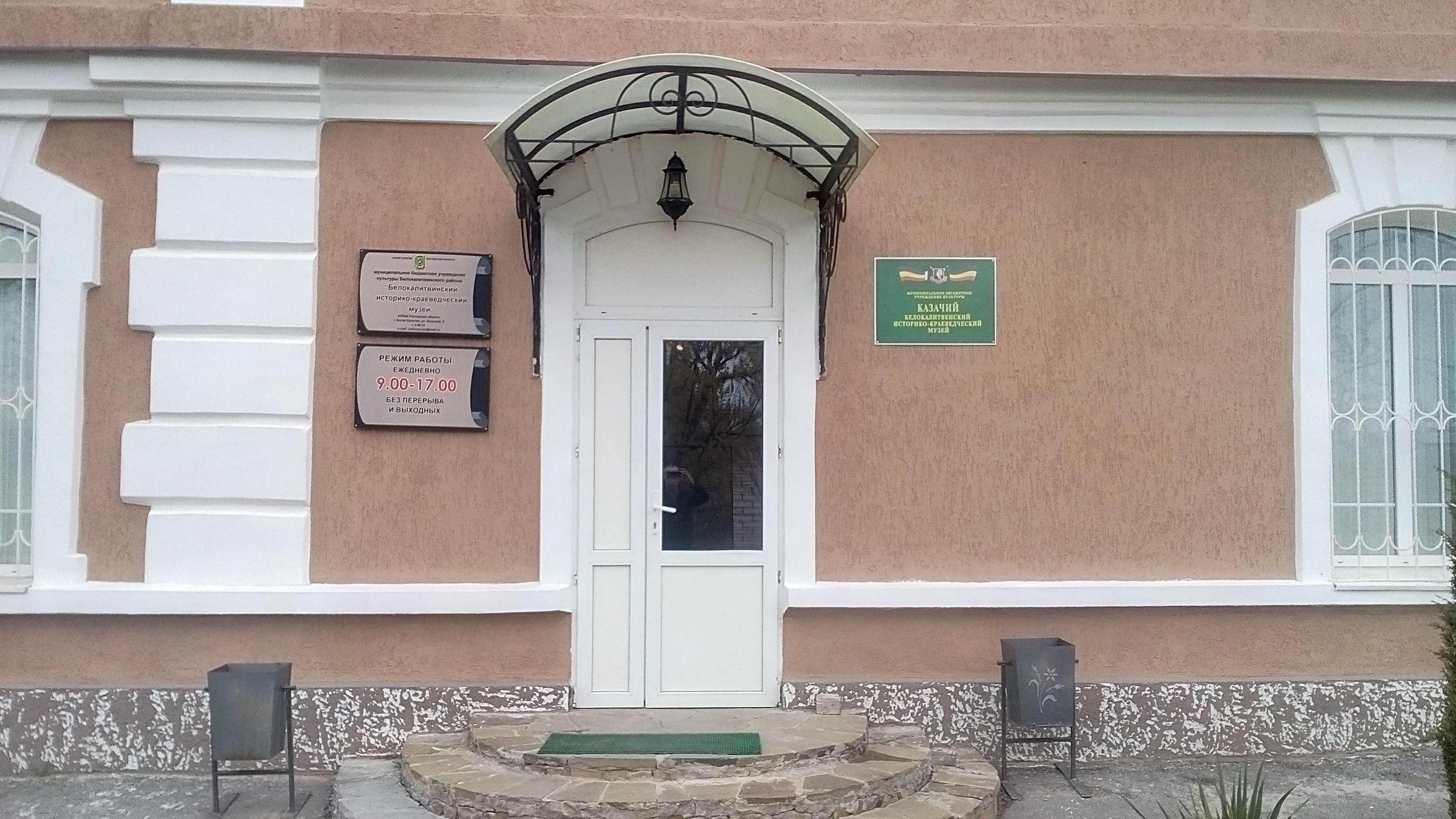 Белая Калитва: вход в городской музей